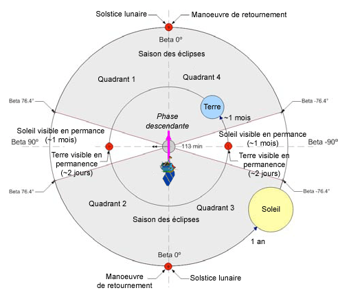 Orbite de LRO autour de la Lune et incidences des évolutions respectives de la Terre et du Soleil